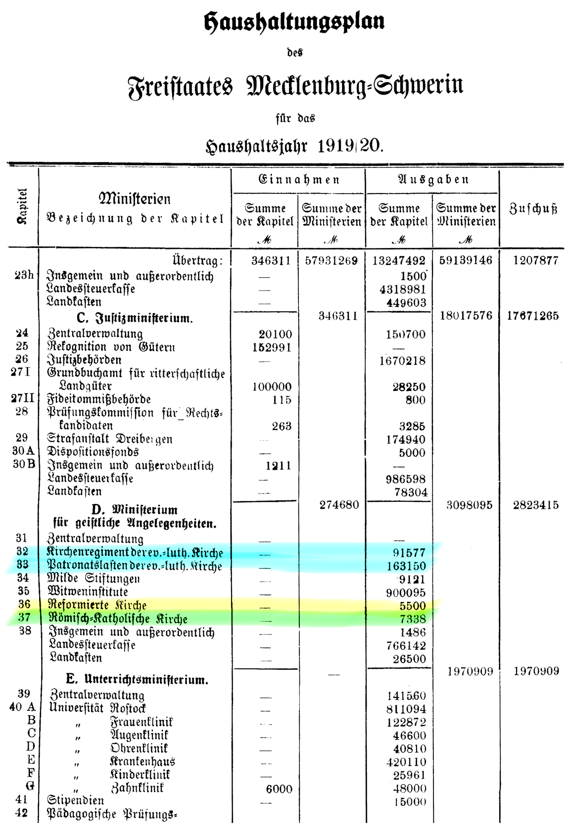 Staatsleistungen an Kirchen im Haushaltsplan des Freistaates Mecklenburg-Schwerin 1919/1920